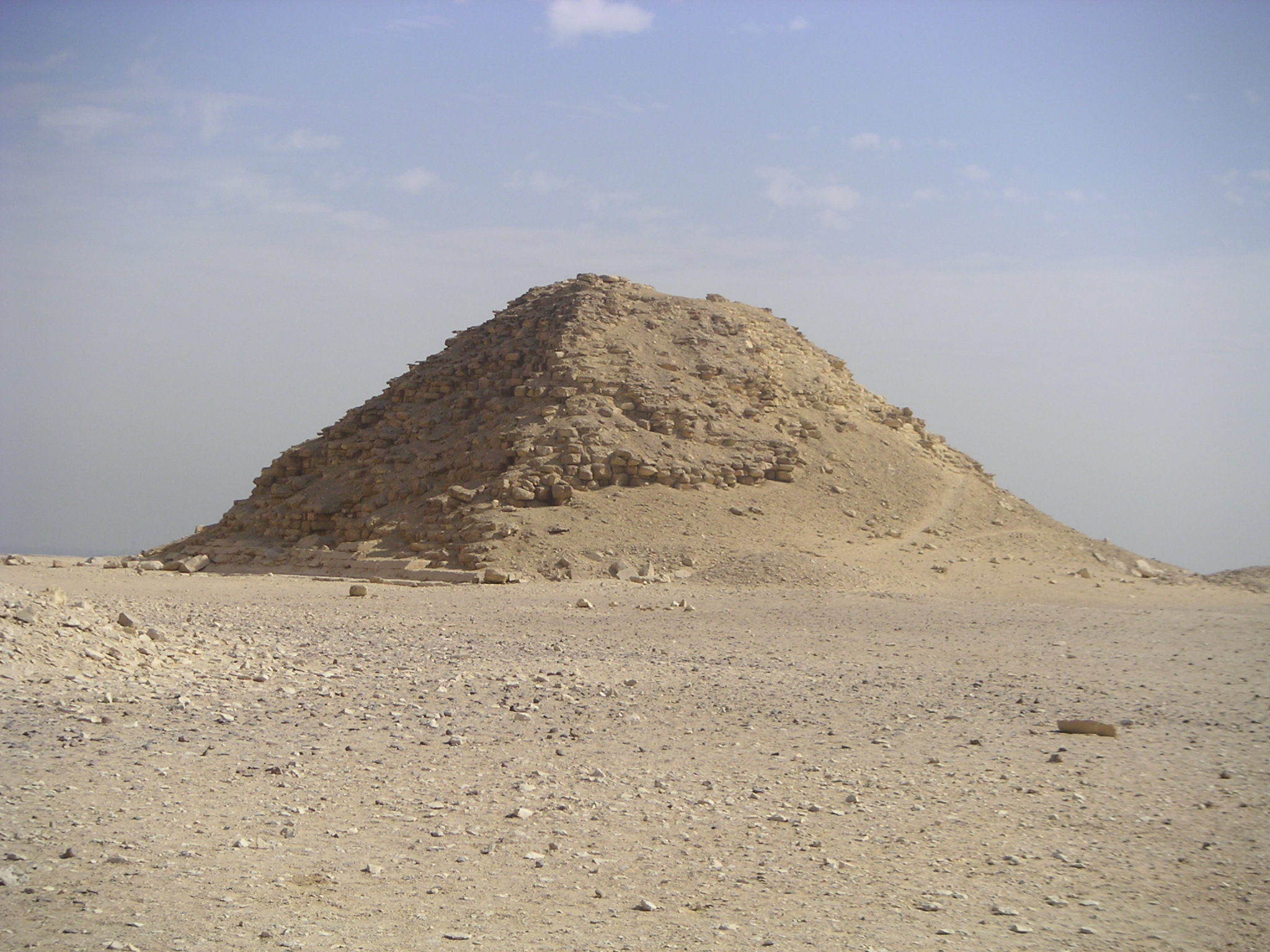 Vue de la pyramide satellite au sud de la pyramide rhomboïdale à Daschour - Règne de Snéfrou - IVe dynastie égyptienne